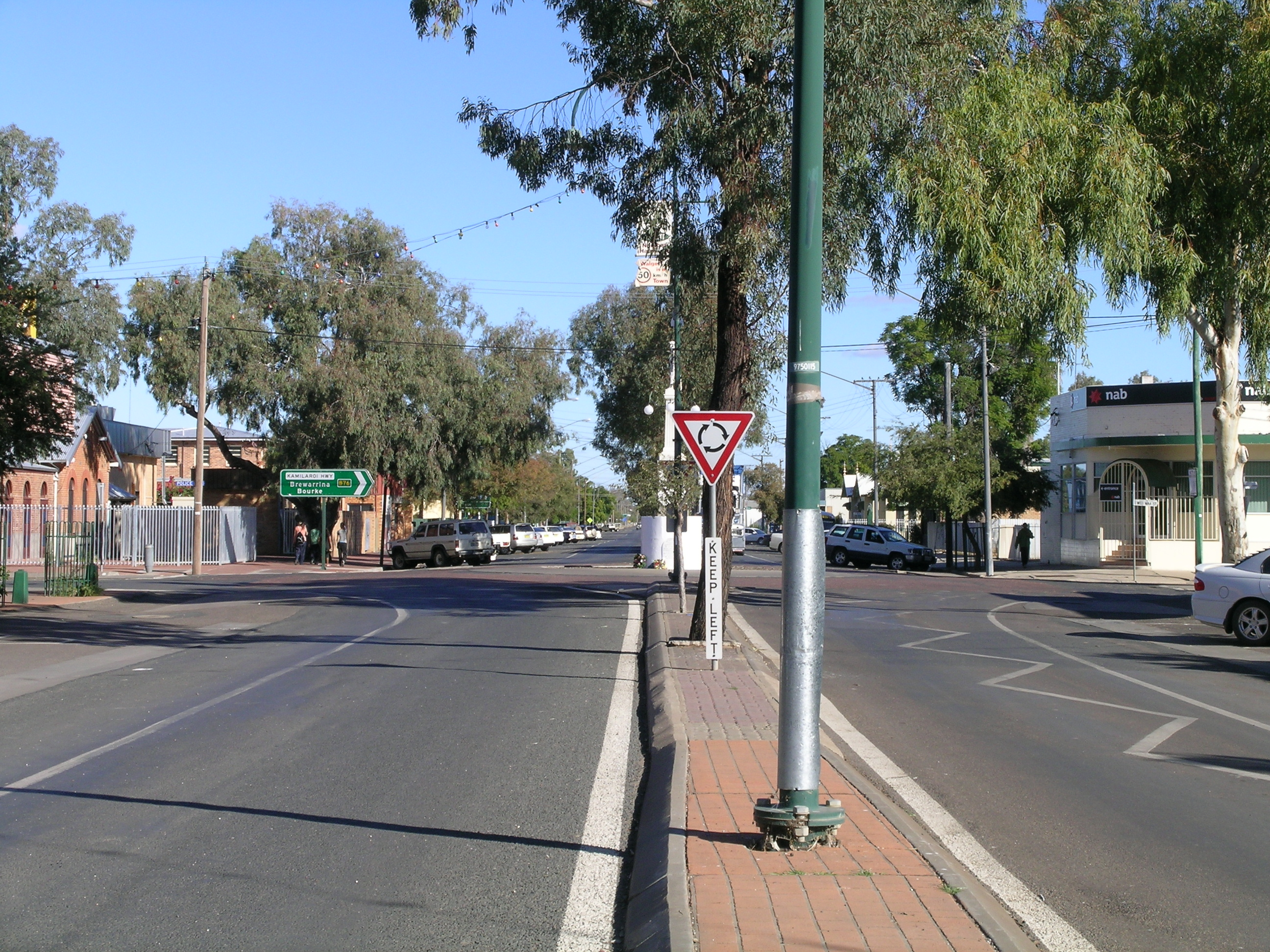 Main street, Walgett, NSW